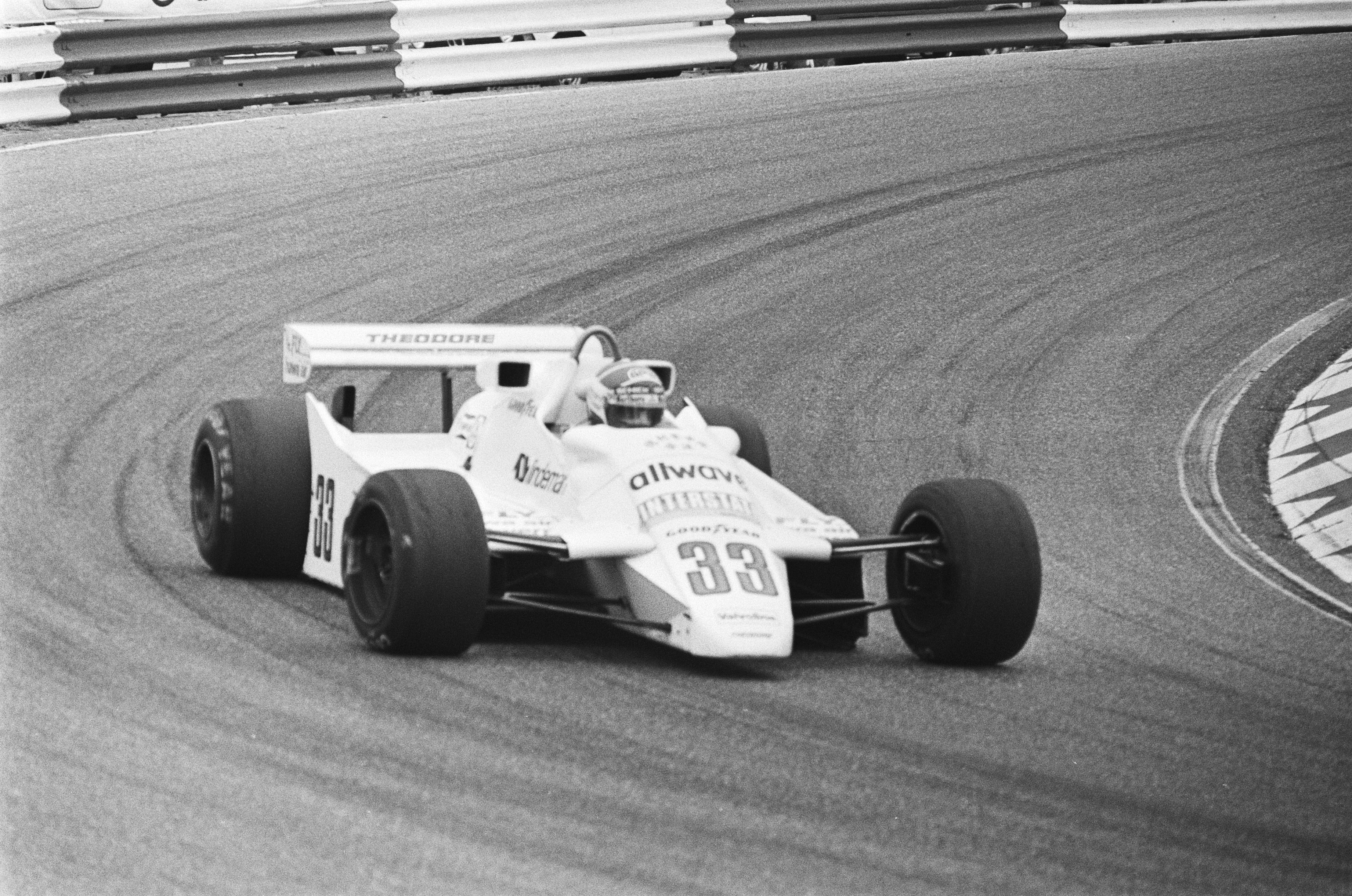 Grand Prix van Nederland te Zandvoort; no. 33 Jan Lammers in aktie.